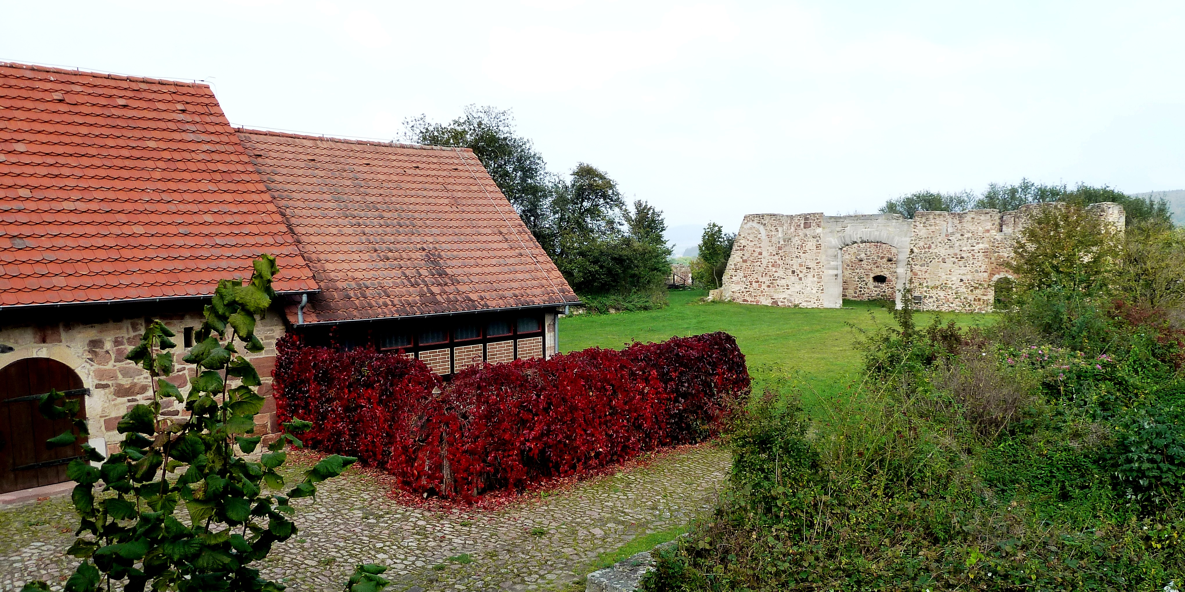 Im Vordergrund befindet sich das ehemalige Torhaus der Kartause Eppenberg, das heute ein Bienenkundemuseum enthält. Im Hintergrund ist die Ruine der ehemaligen Klosterkirche zu erkennen. Der Bezirksimkerverein Felsberg übernimmt die Pflege der Anlage.